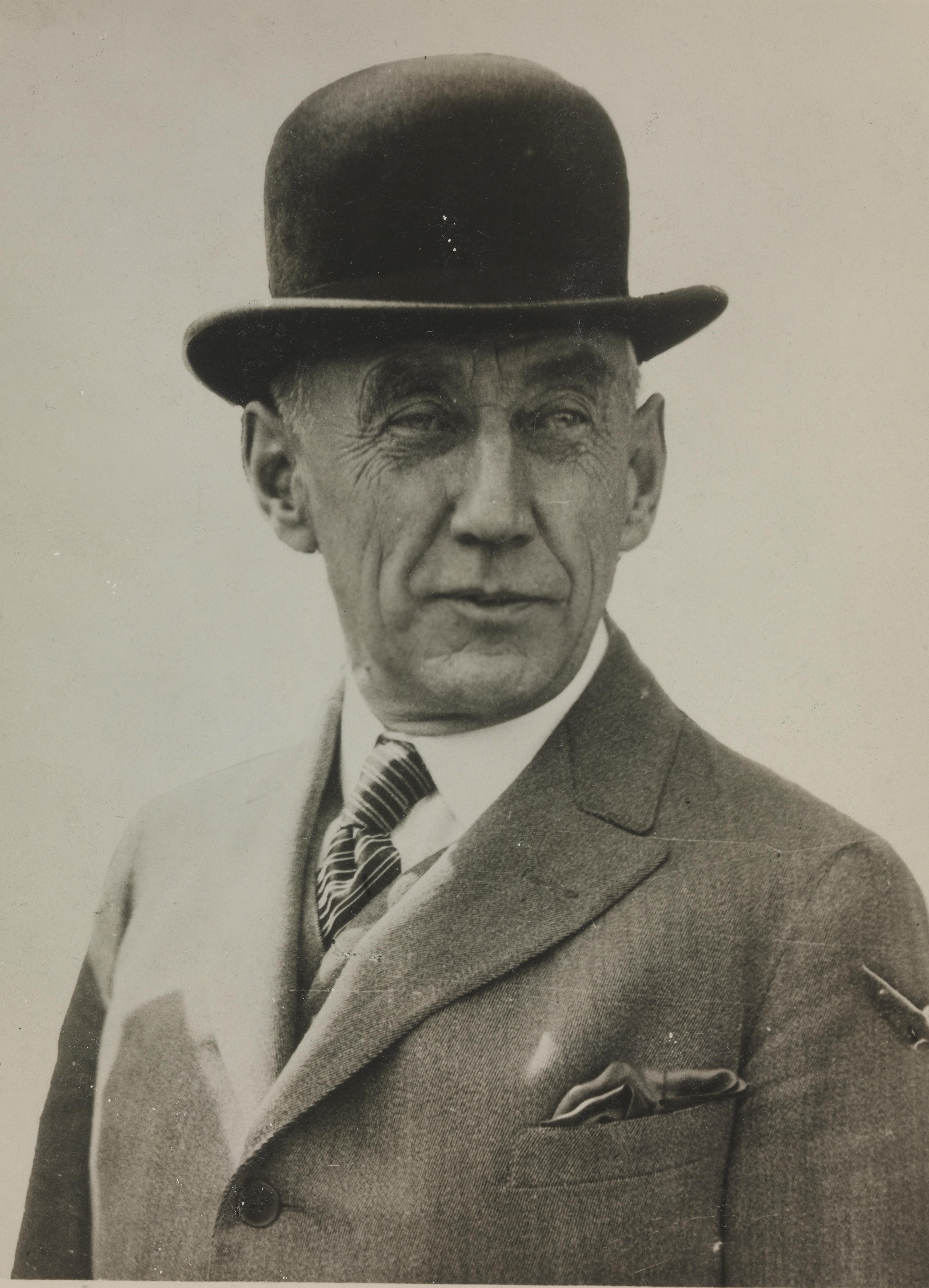 Bildet er hentet fra Nasjonalbibliotekets bildesamling. Anmerkninger til bildet var: Alternativ tittel hentet fra nummerering i Amundsen-basen. Depicted person: Amundsen, Roald Engelbregt Gravning